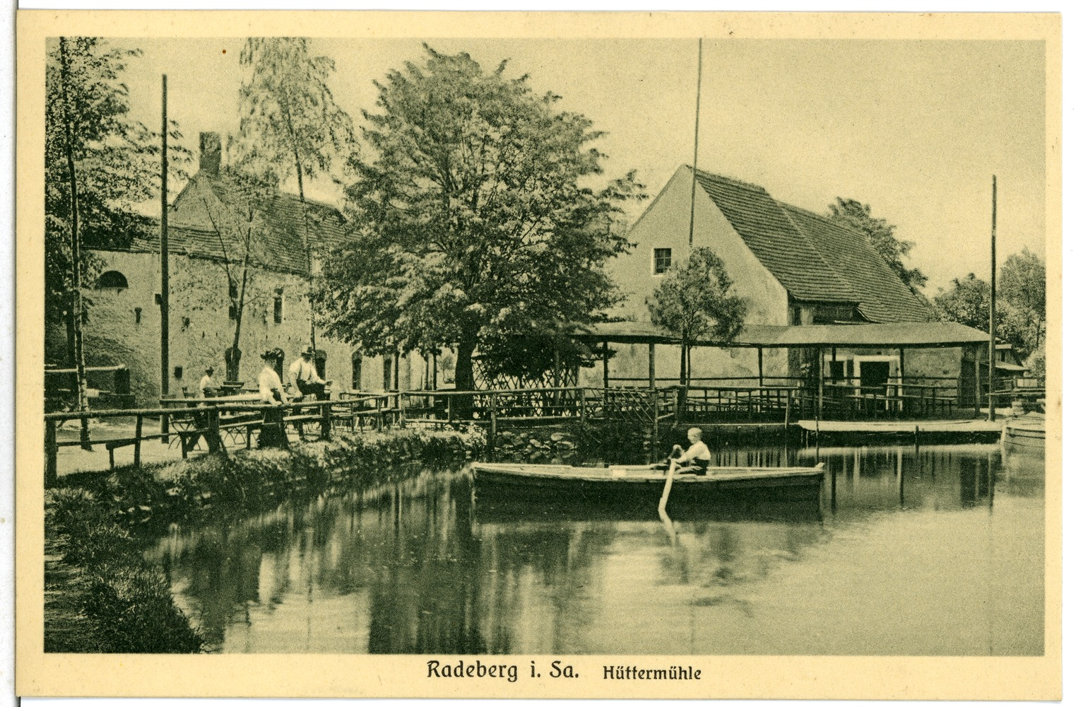 Radeberg; Hüttermühle This postcard is from publisher Brück & Sohn in Meißen ( postcard has a unique number 07394 and is available in a higher resolution at the publisher. This images was uploaded in a cooperation project between Wikipedians and the publisher.